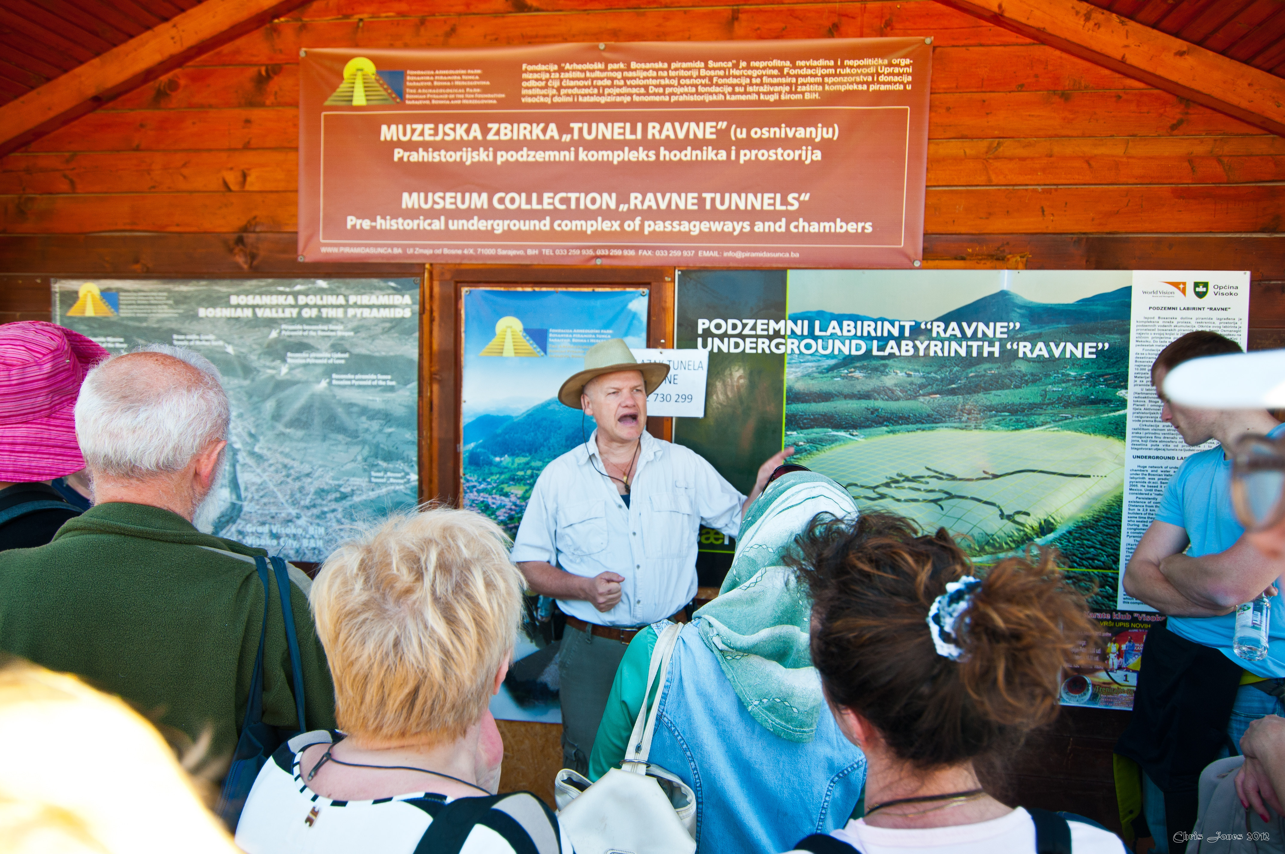 Bosnia and Herzegovina Apr-29-2012 014